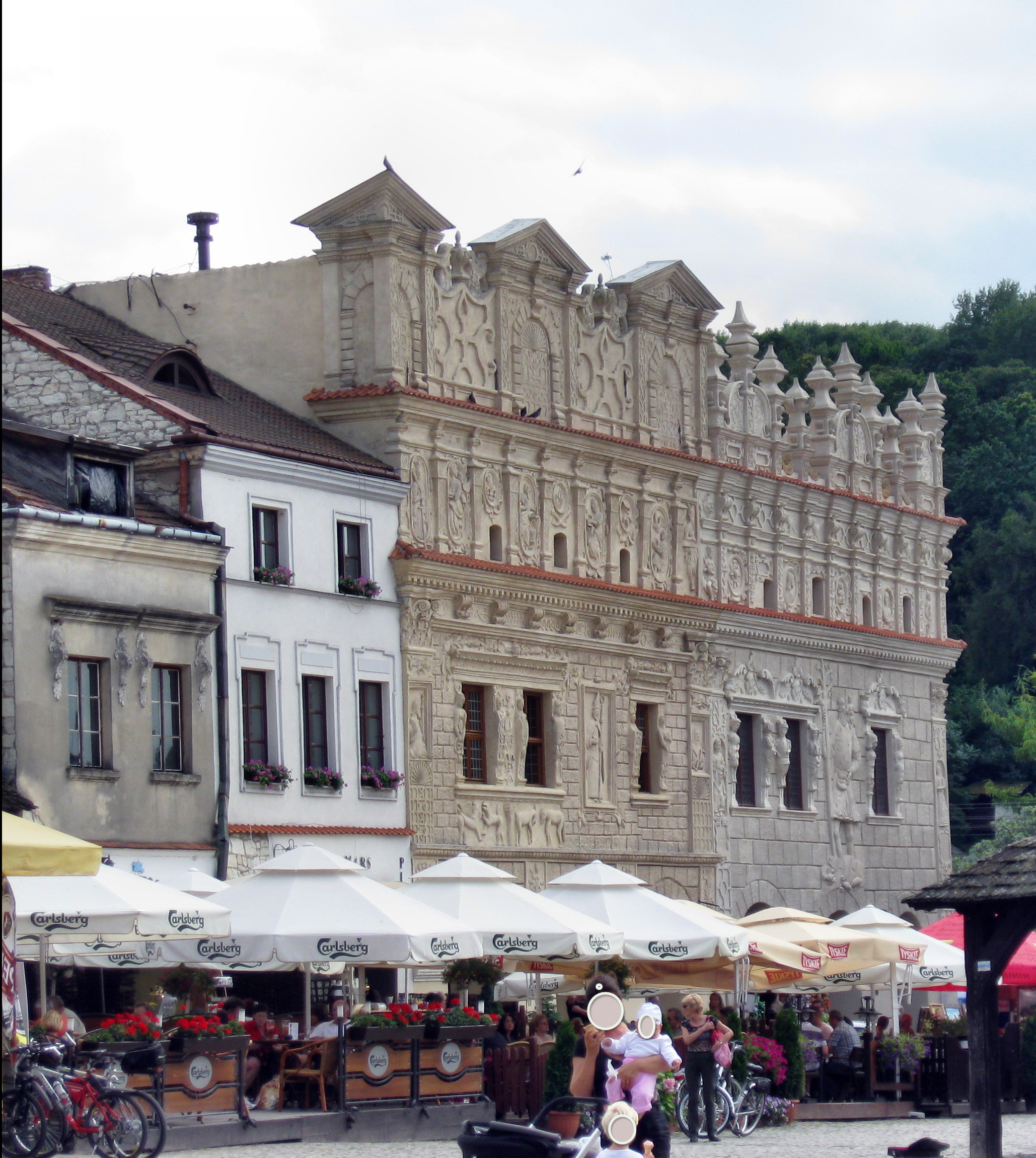 Kamienice na Rynku, od lewej nr 10, 11, 12- Pod Św. Mikołajem, 13- Pod Św. Krzysztofem